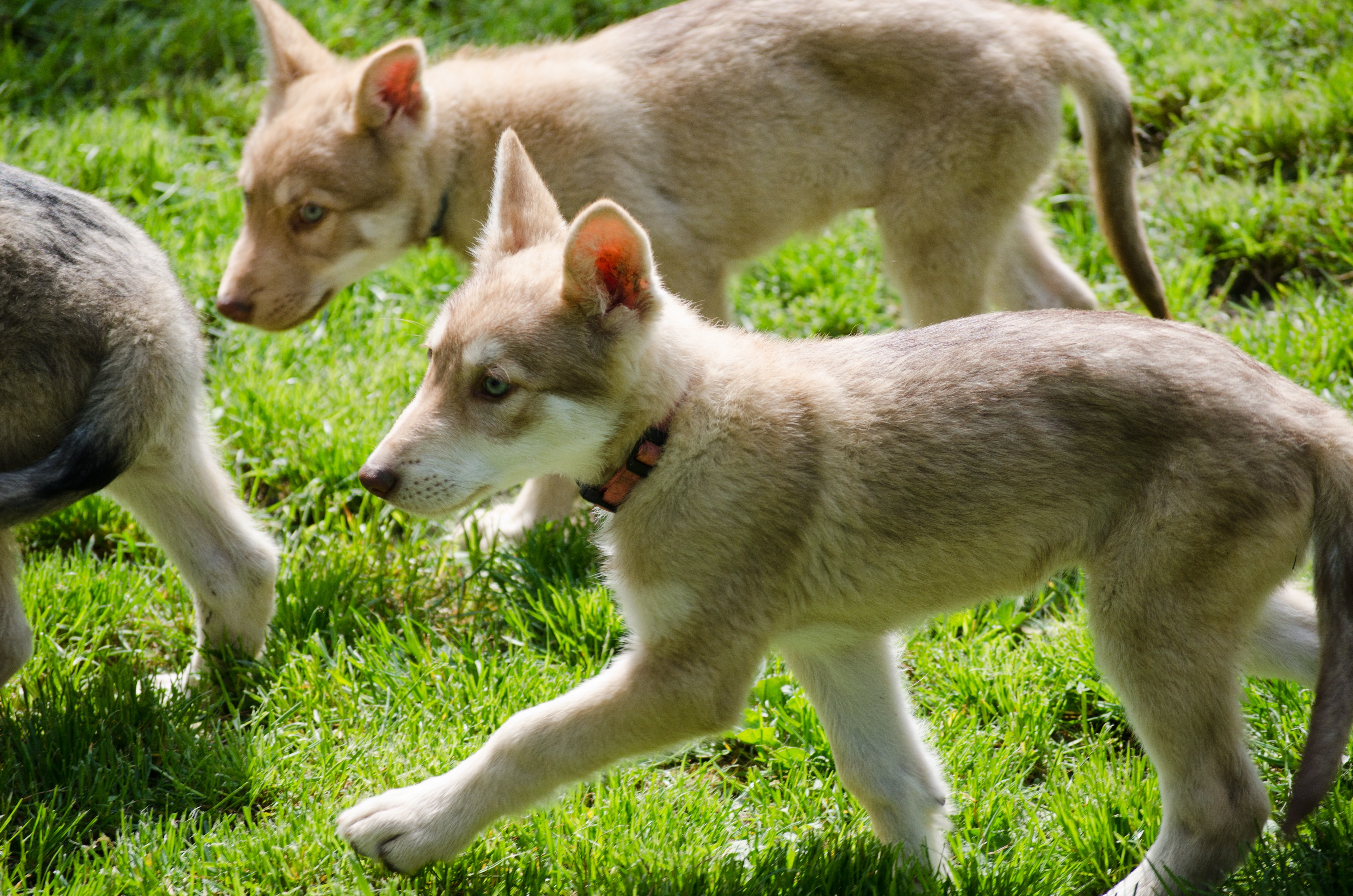 Saarlooswelpen aus der Zuchtstätte Netis Tala